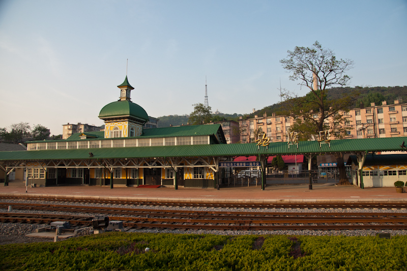 Bahnstation Lüshunkou, erbaut im russischen Stil